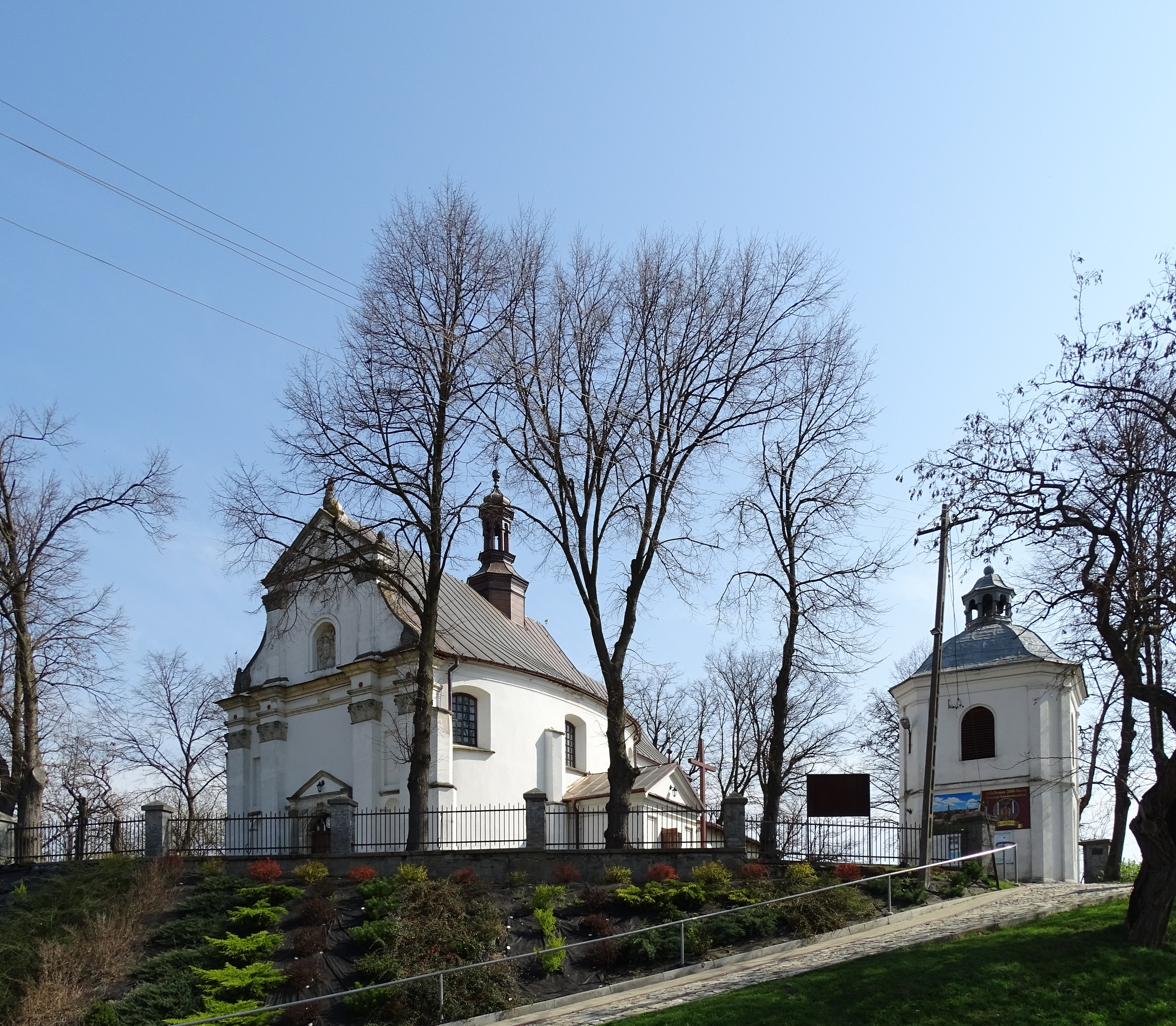 Samborzec, Sandomierz County, Poland. Church of the Holy Trinity, built 1691.